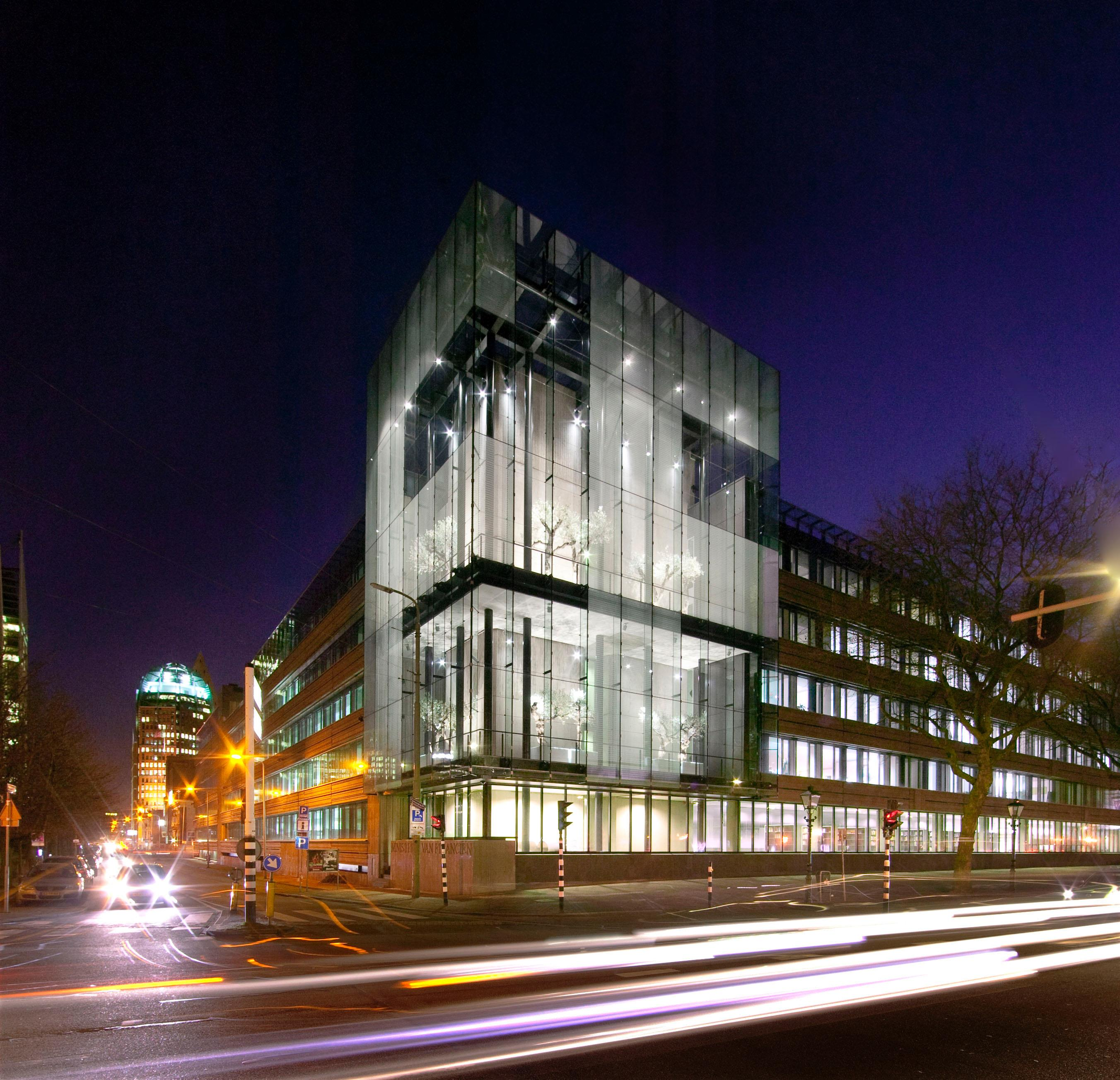 Wintertuin Ministerie van Financiën - na de renovatie.